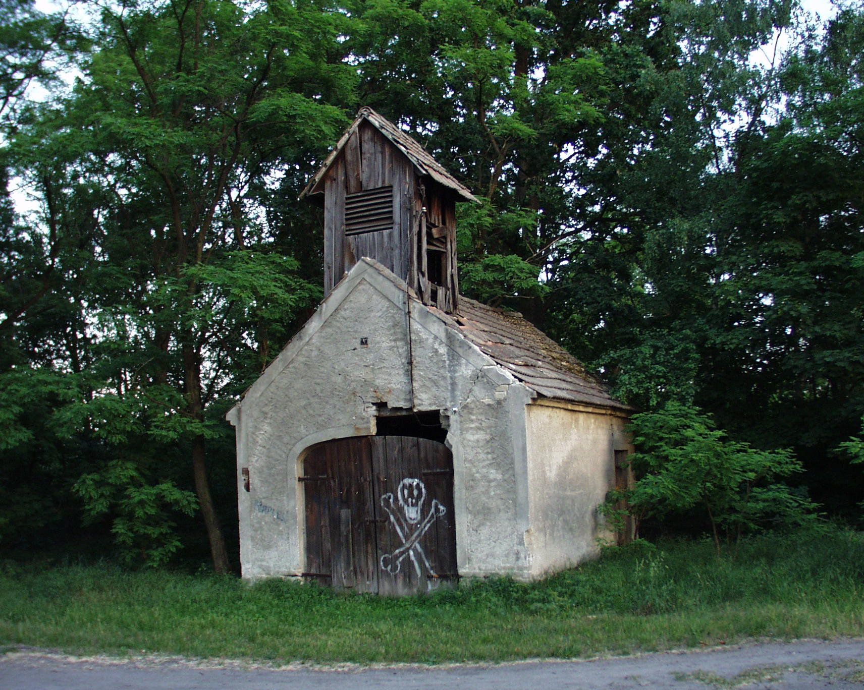 remiza strażacka w Bronkowie